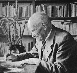 Anders Kilian (1869-1953)